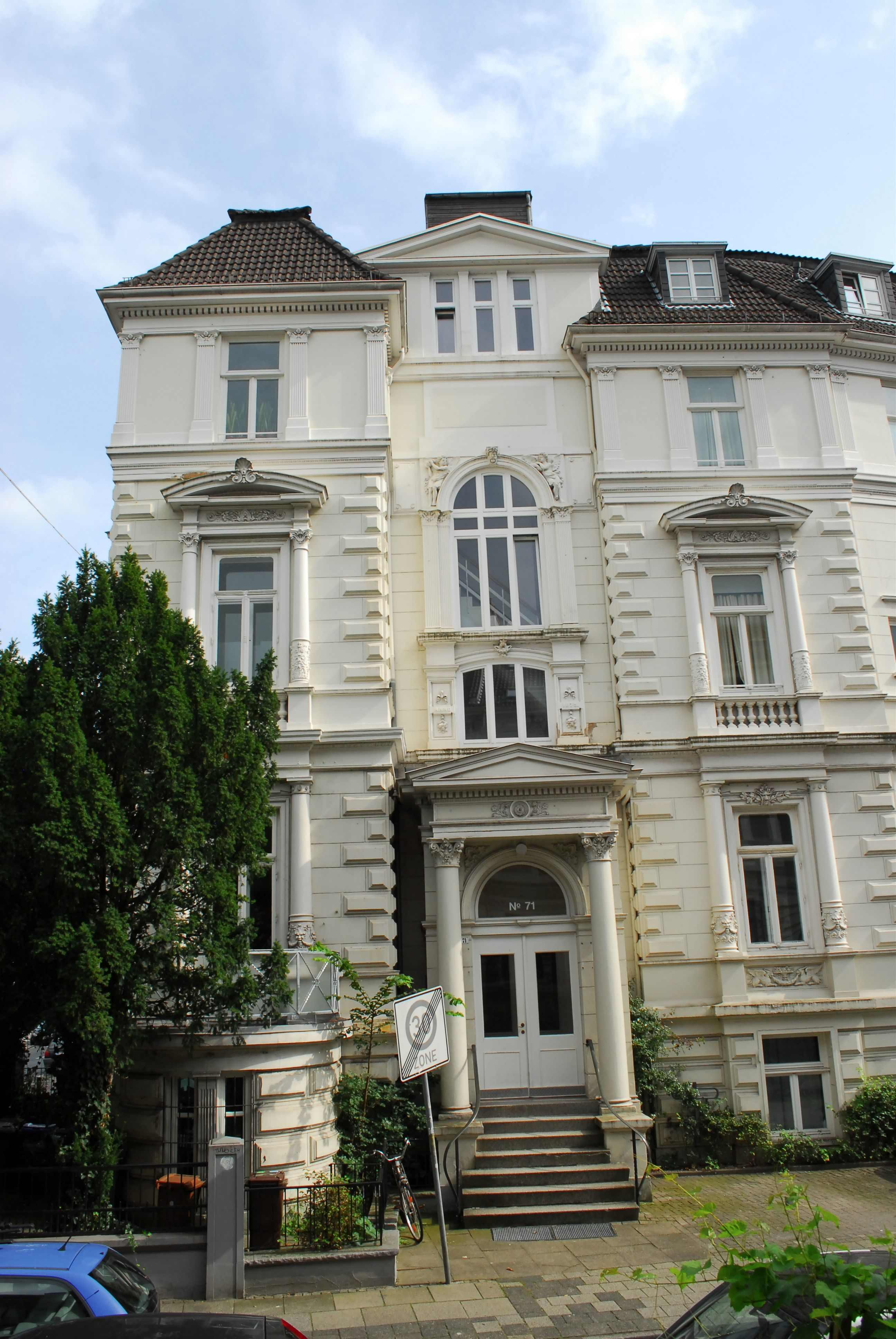 Herder-Klinik in Bremen, Herderstraße 71 / Bismarckstraße.Das abgebildete Objekt ist ein geschütztes Kulturdenkmal in der Freien Hansestadt Bremen, mit der Nr. 0541 beim Landesamt für Denkmalpflege registriert.